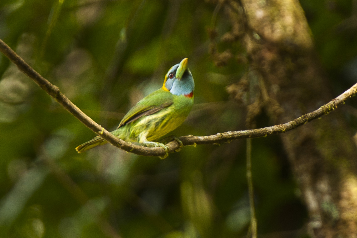 Versicolored Barbet - Manu NP_8213